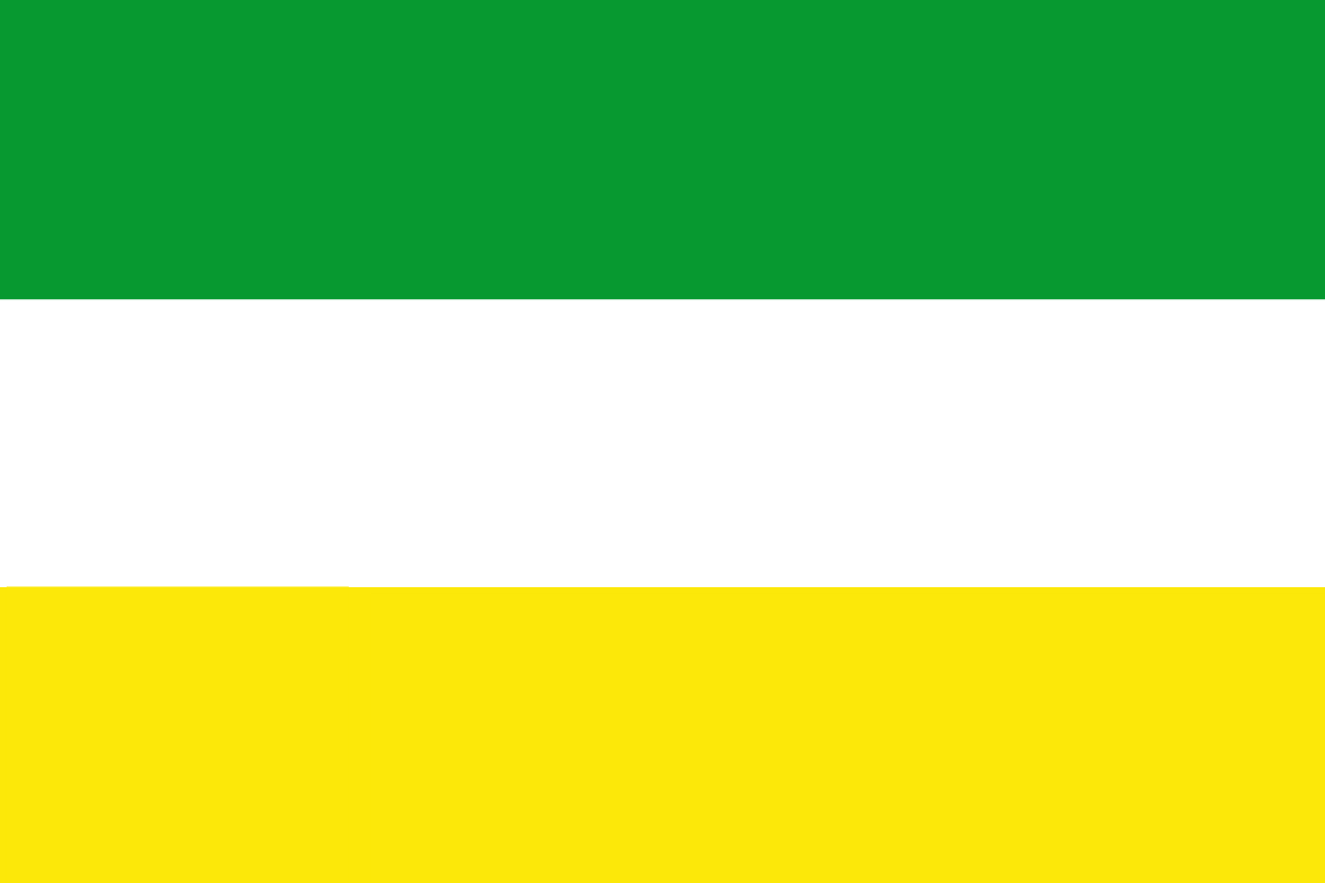 Es la bandera de La Herradura